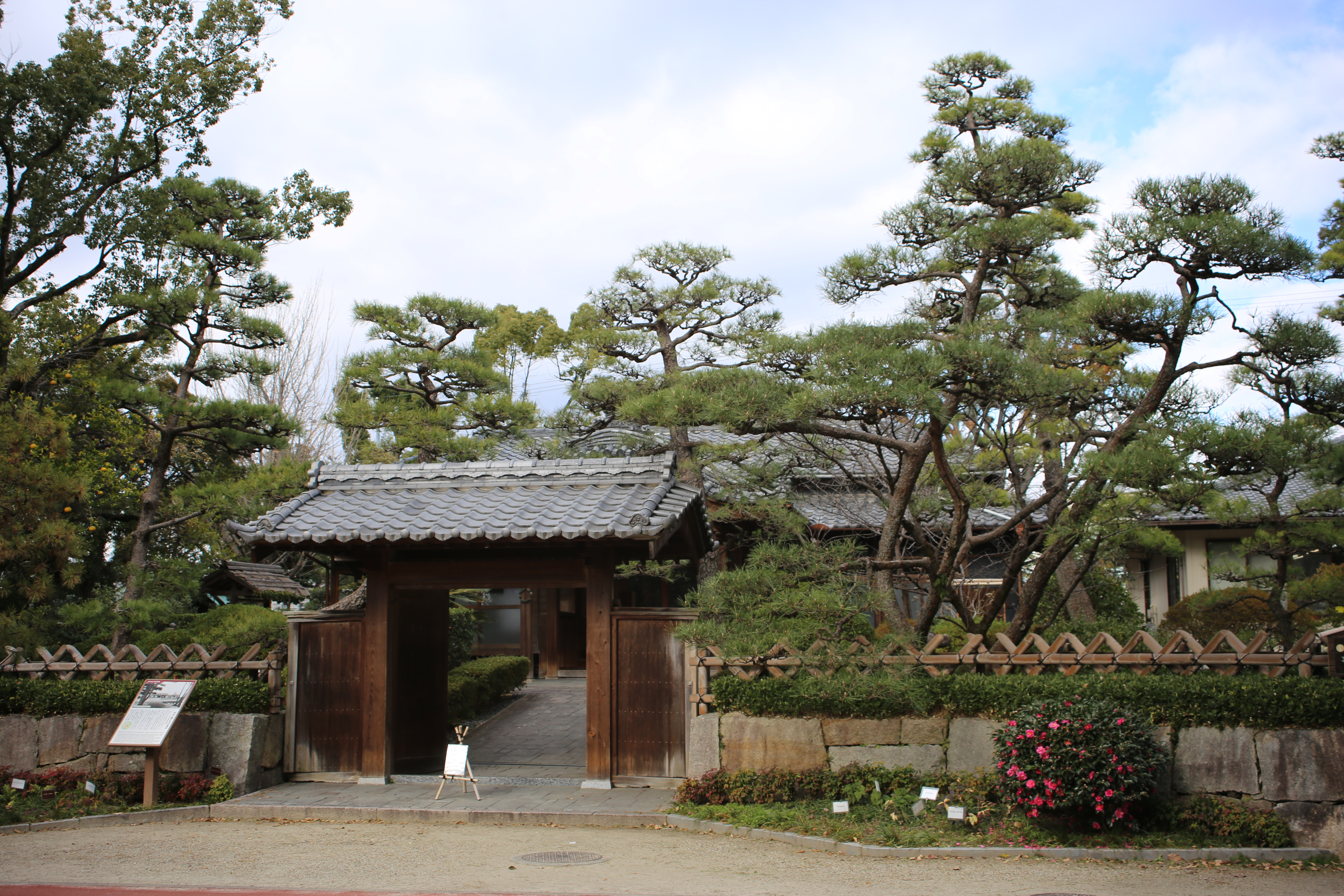 名古屋市中村区中村町の中村公園の中村公園記念館